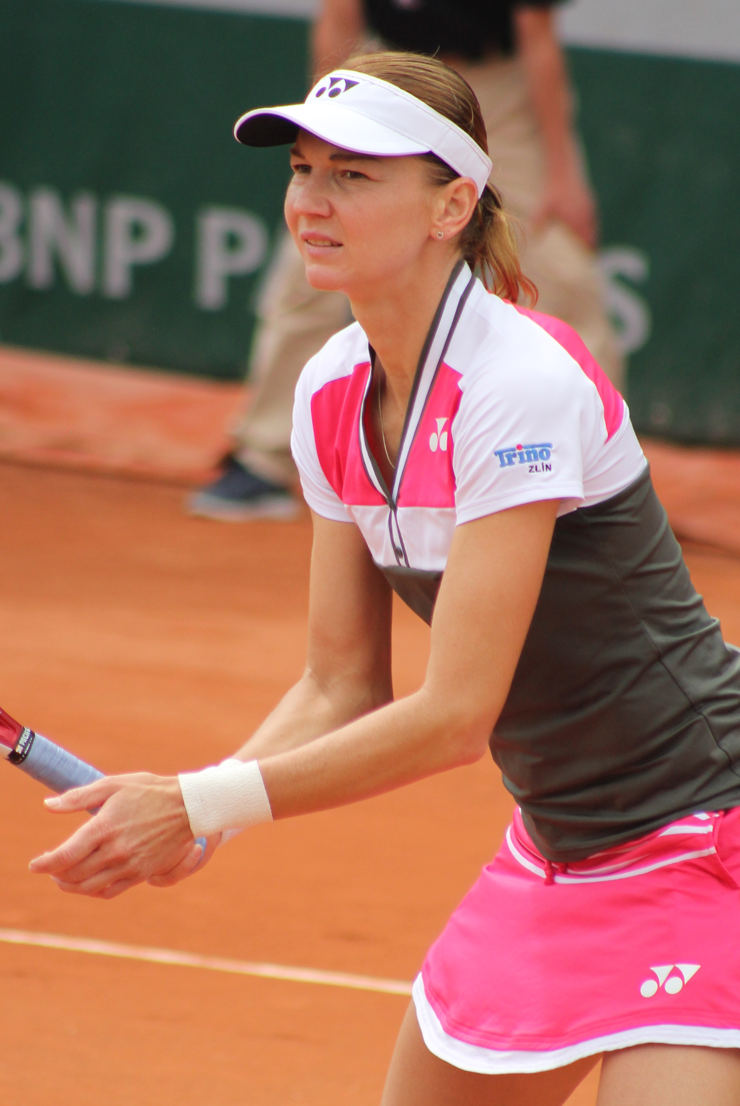 Voracova RG15 (7)